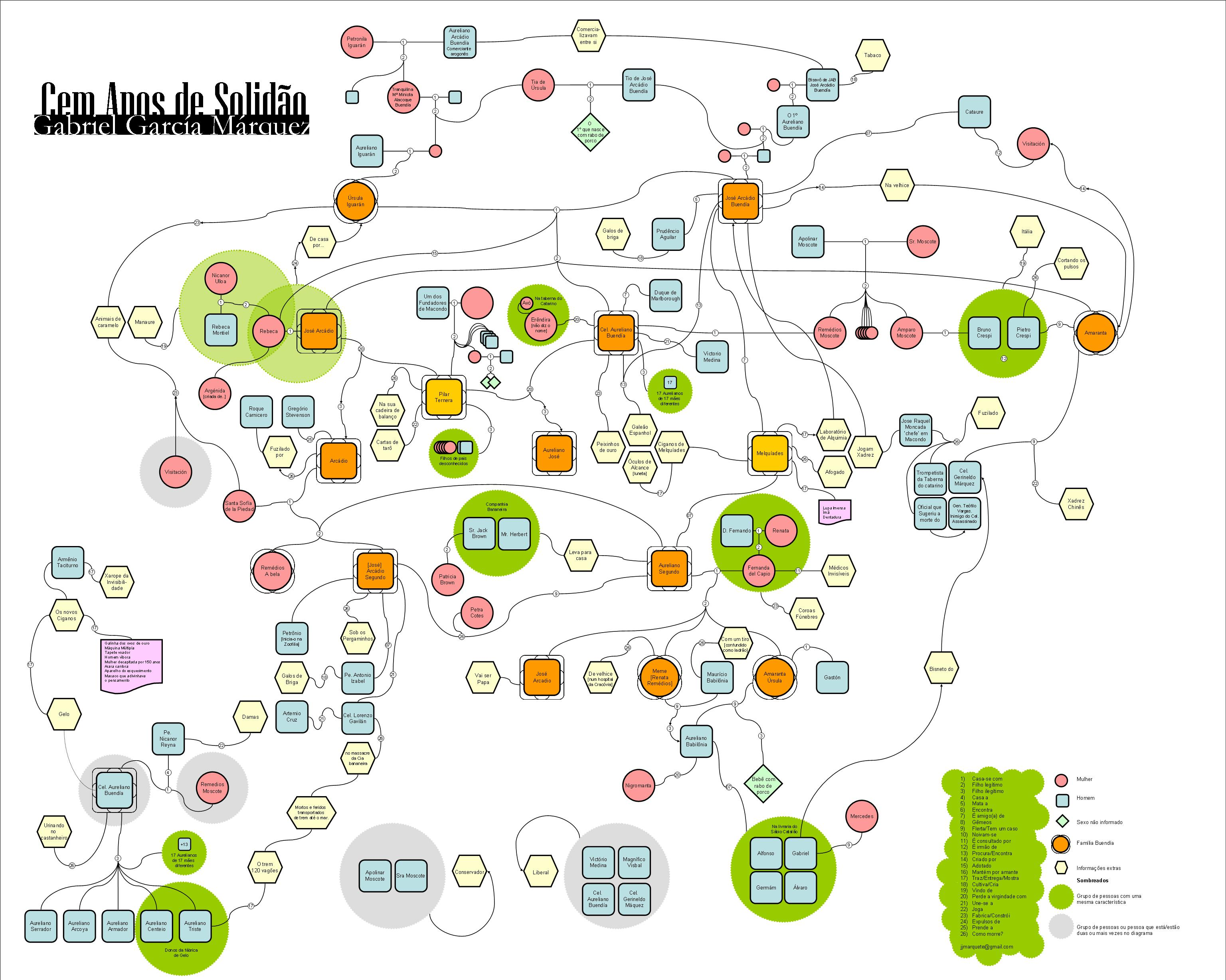 Resumo Gráfico da Obra Cem anos de Solidão